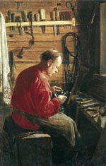 На картине изображен шорник, занимающийся своим мастерством